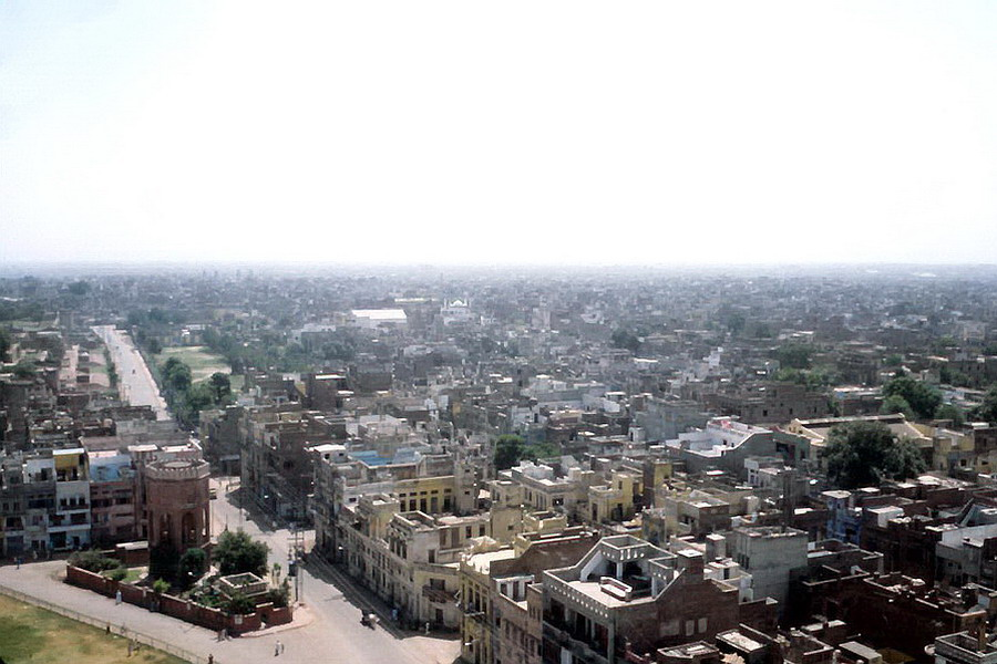 Pakistan Lahore - vue aérienne